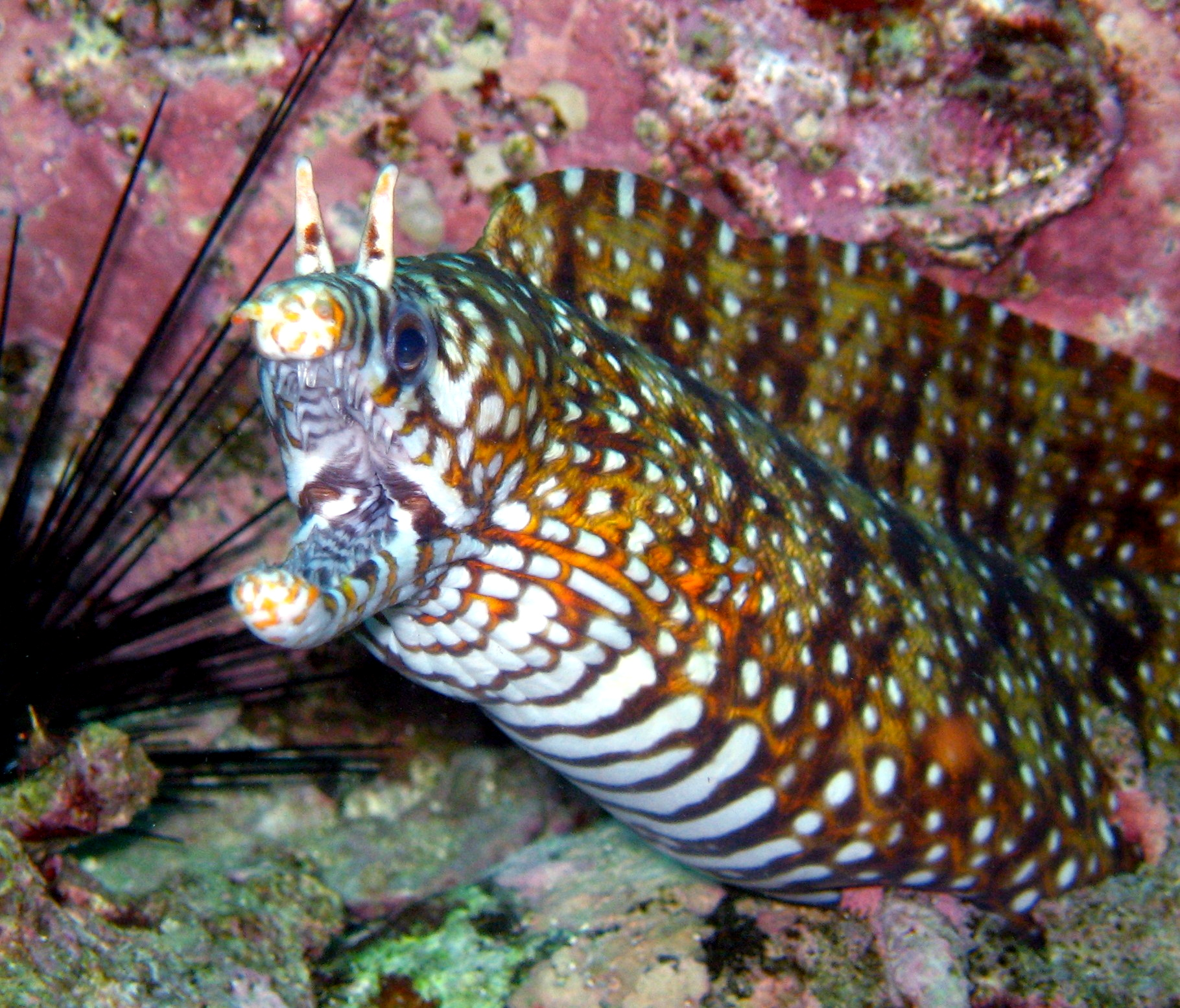 Drachenmuräne (Enchelycore pardalis) in Kashiwajima Kohchi-ken(Prefecture), Japan